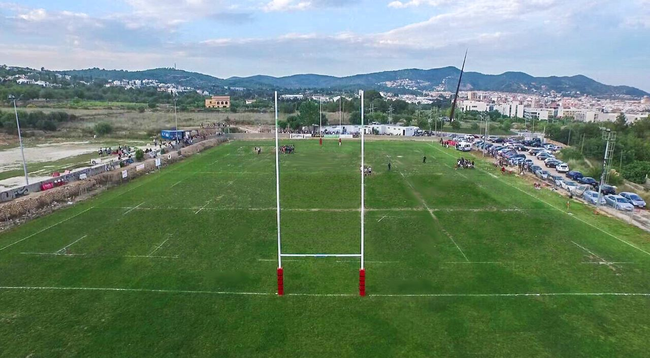 Campo Municipal de Santa Bàrbara